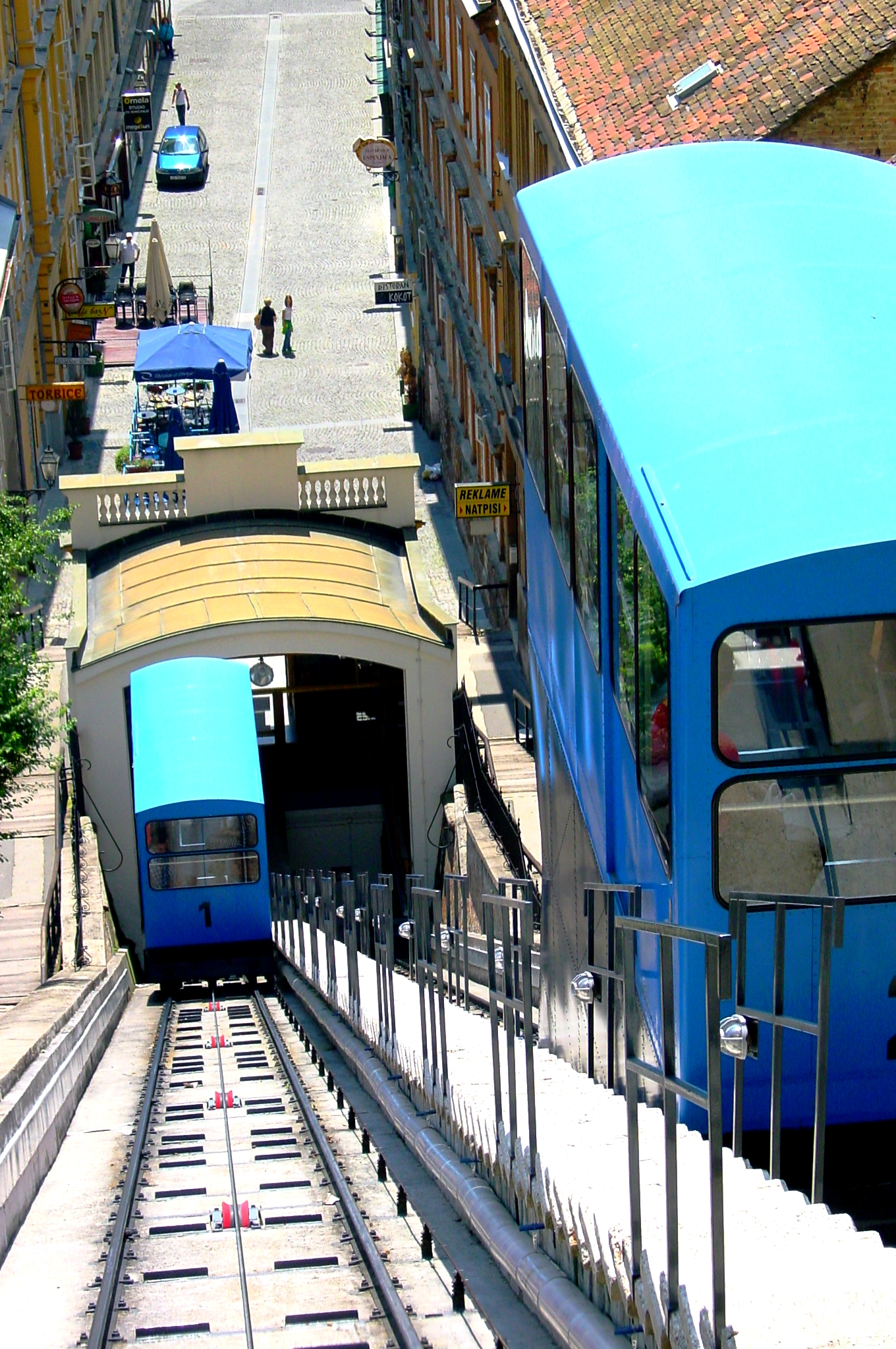 Vue plongeante du funiculaire sur le funiculaire de Zagreb, Republika Hrvatska (Croatie)